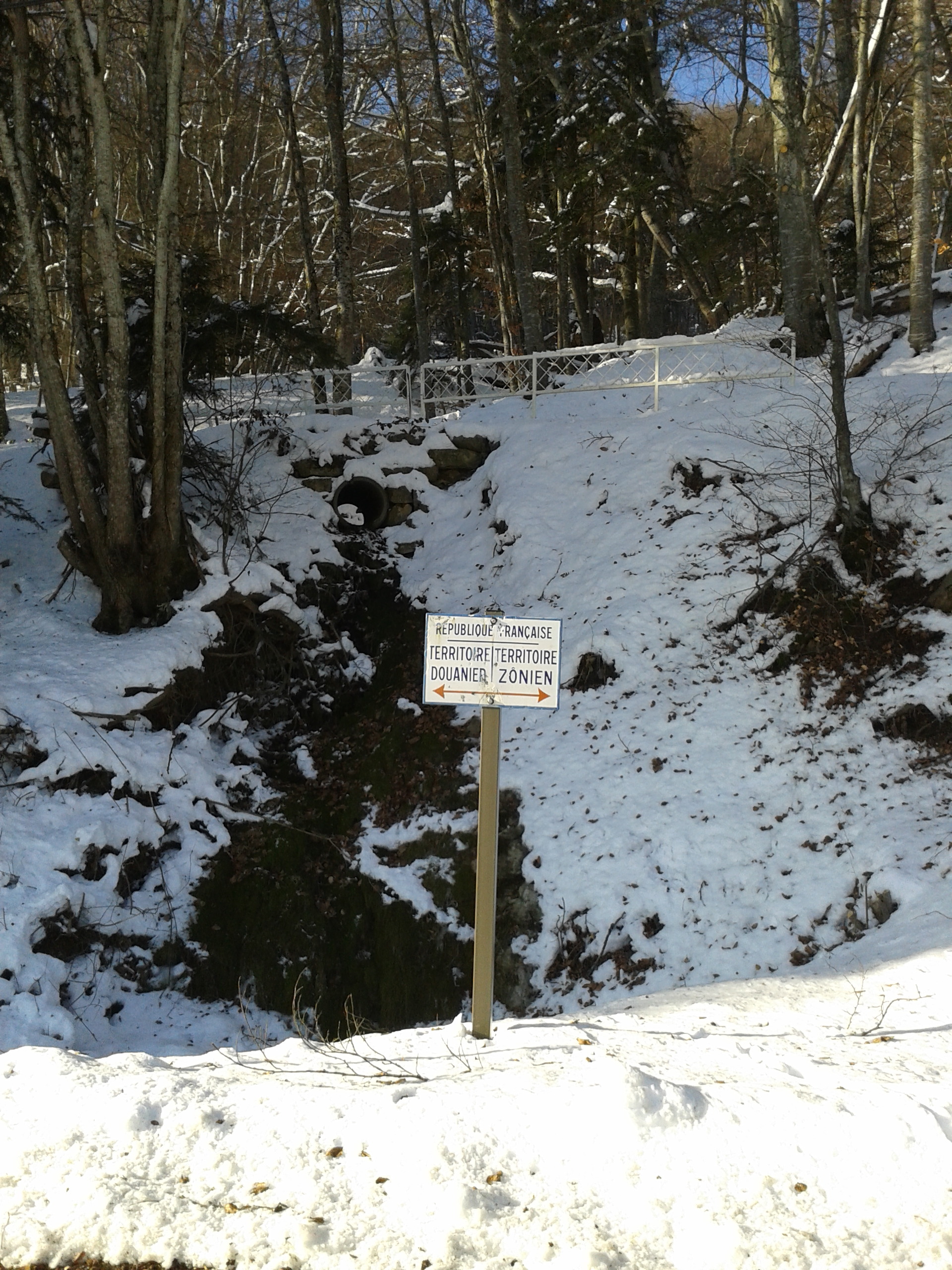 Panneau indiquant la limite de la zone franche en Haute Savoie, commune du Sappey.